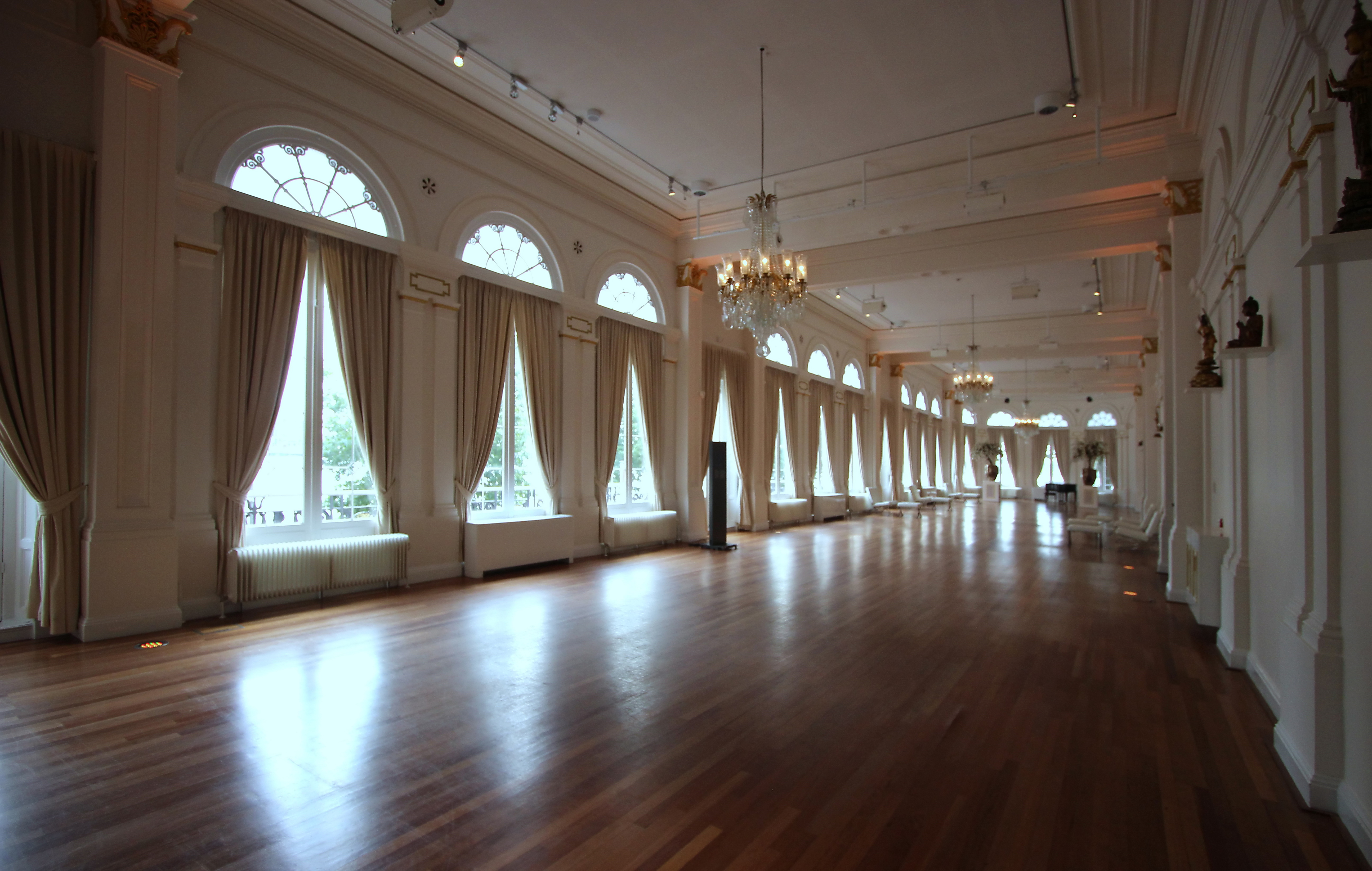 ballroom worldmuseum rotterdam (28)